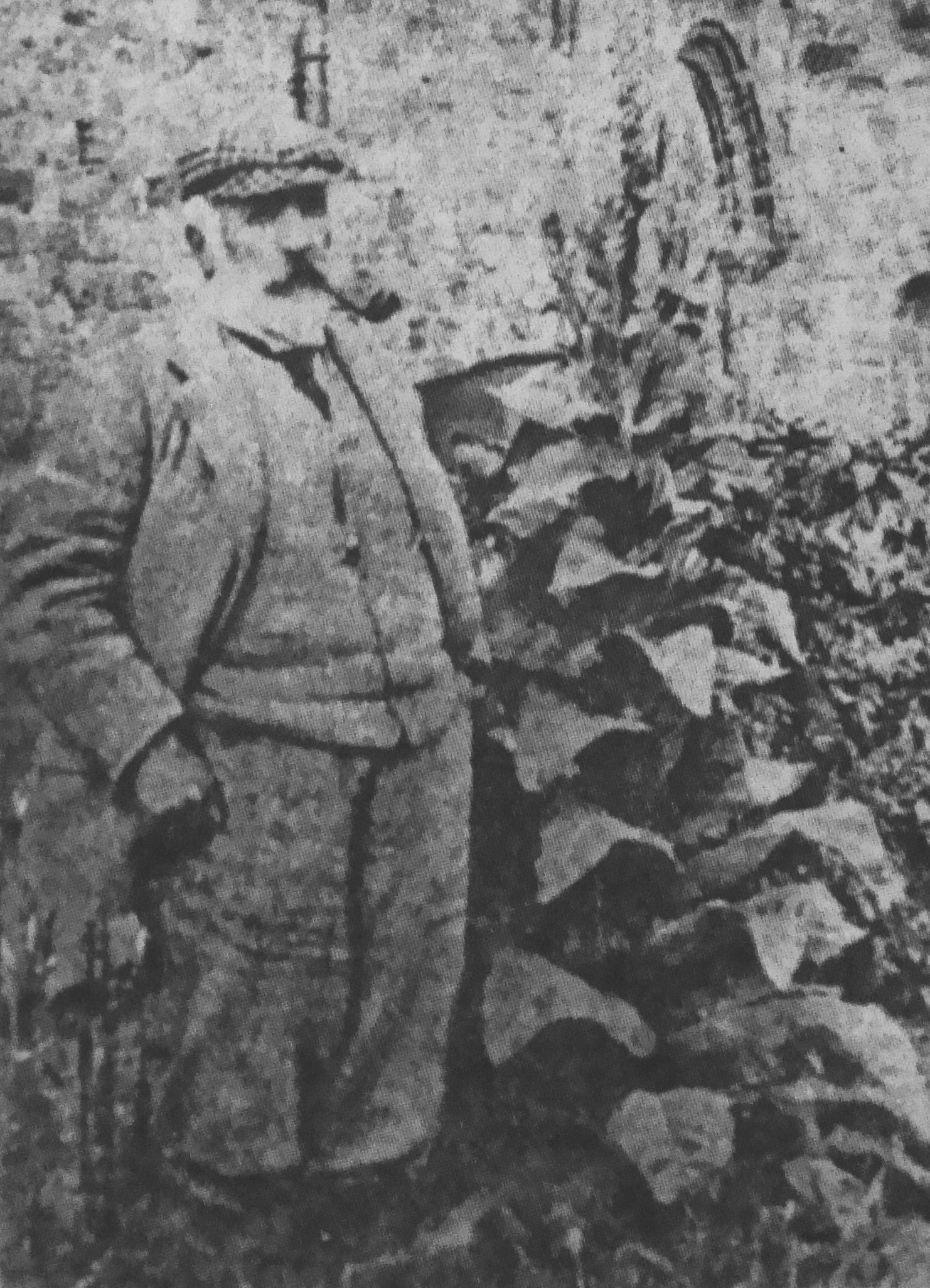 വില്യം ലോഗൻ. മാതൃഭൂമിയിൽ നിന്ന്. ചിത്രം 1914-നു മുൻപുള്ളതാണ് (ചിത്രത്തിലെ വ്യക്തി 1914-ൽ മരണമടഞ്ഞു)